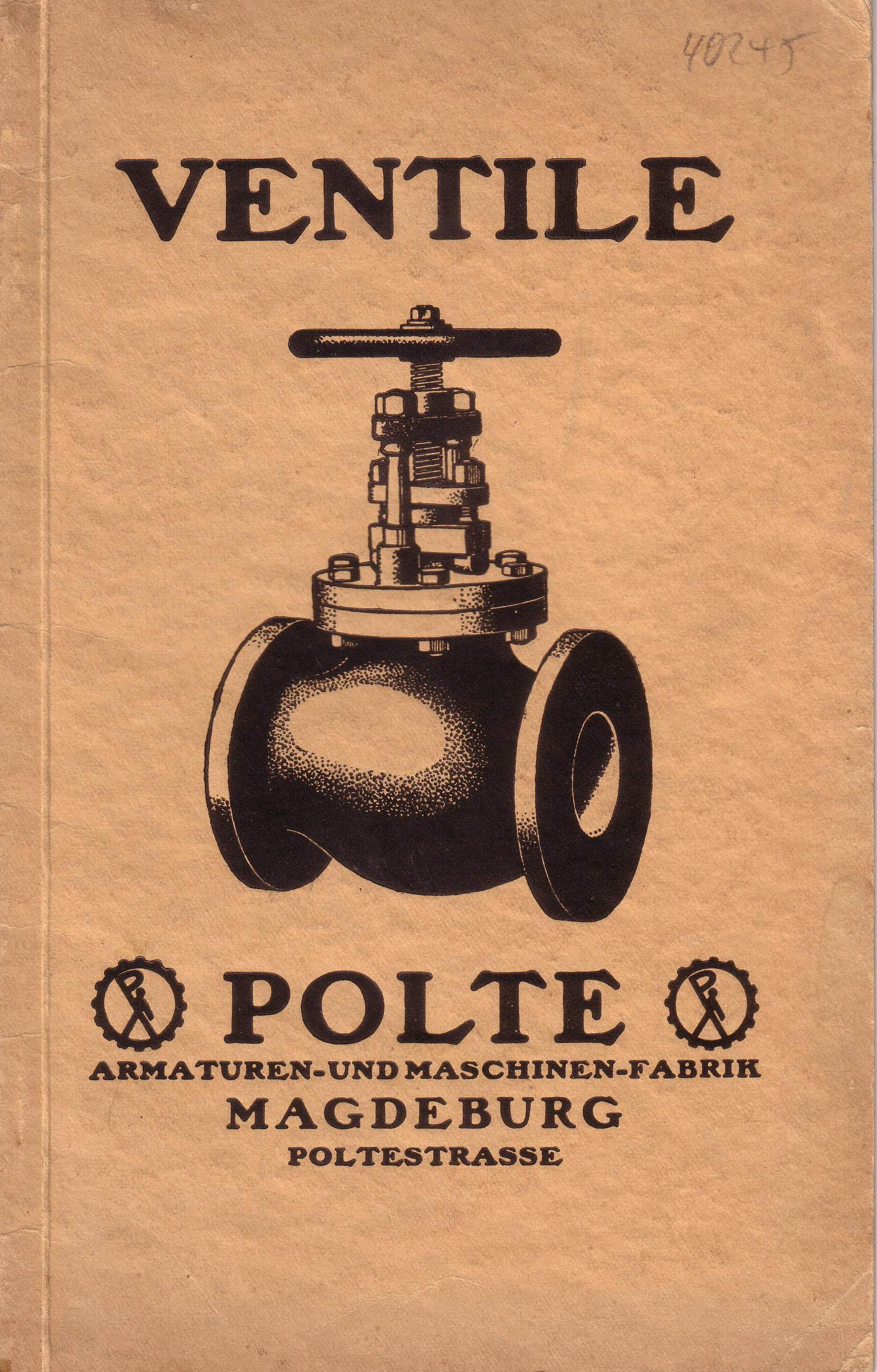 Preisliste und Katalog zu Ventilen der Polte-Werke in Magdeburg